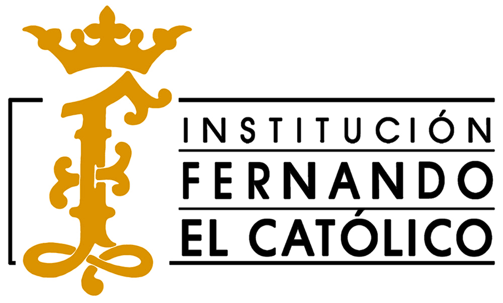 Logo de la IFC